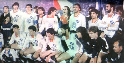 Nacional Campeon de America de 1988